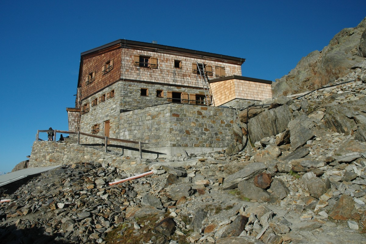 Similaunhuette (3019m)